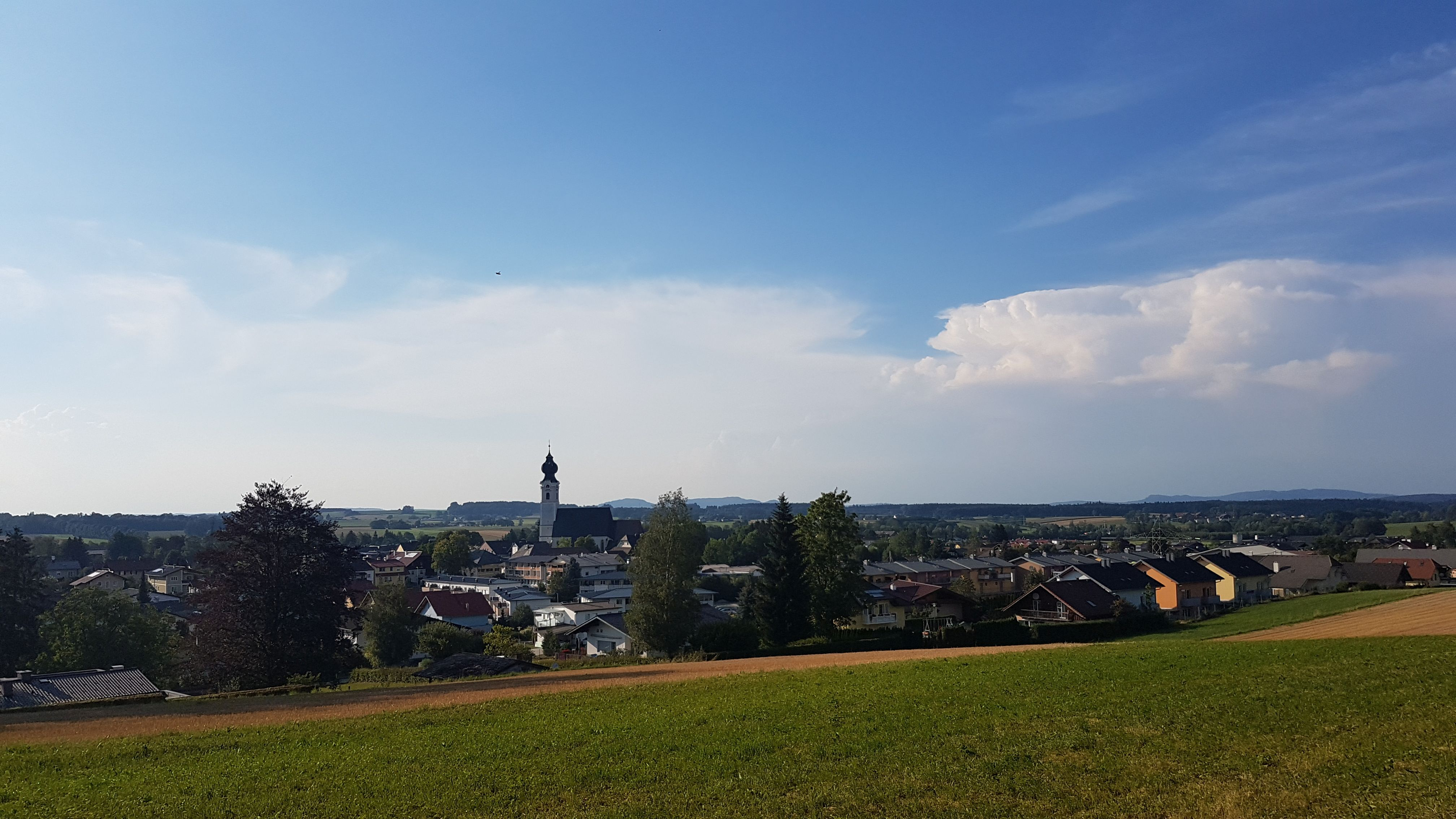 Blick auf St- Georgen im Attergau vom Kalvarienberg im Juli 2018.